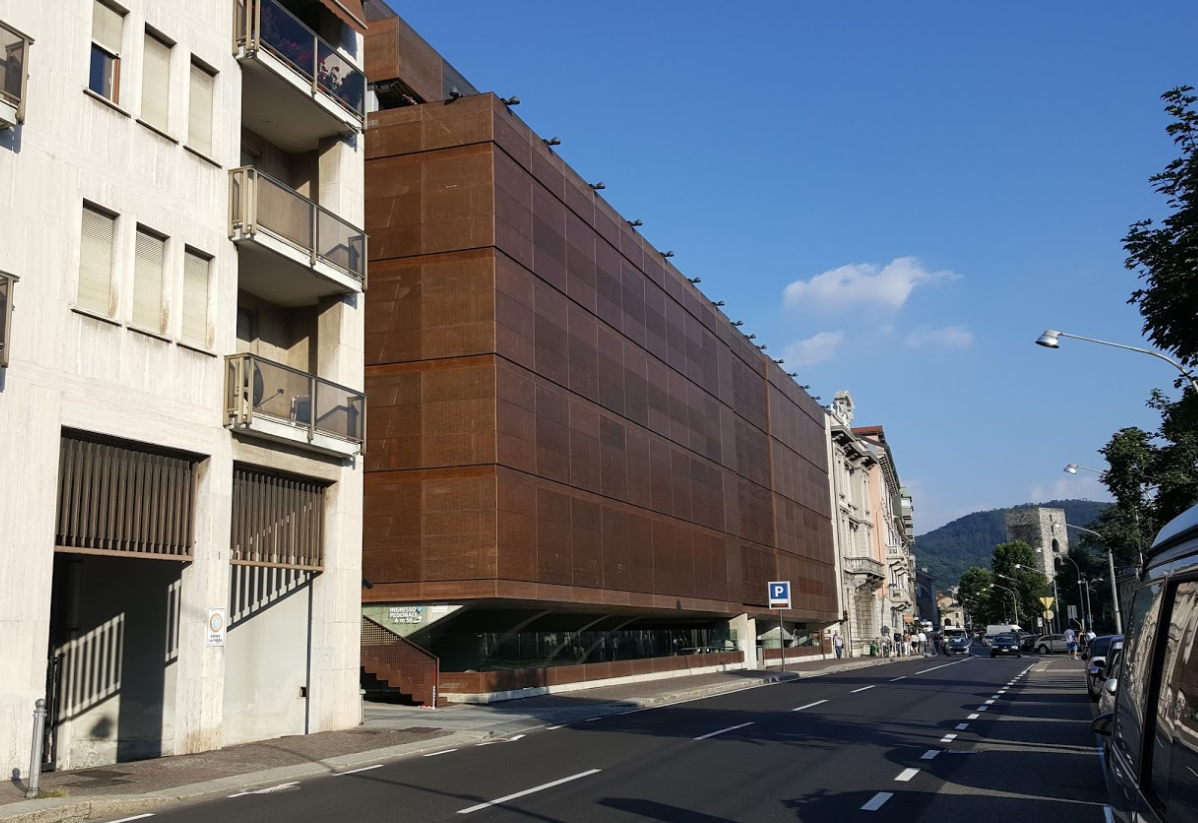 Развалины древнеримского термального комплекса 1-3 века нашей эры в городе Комо, Италия